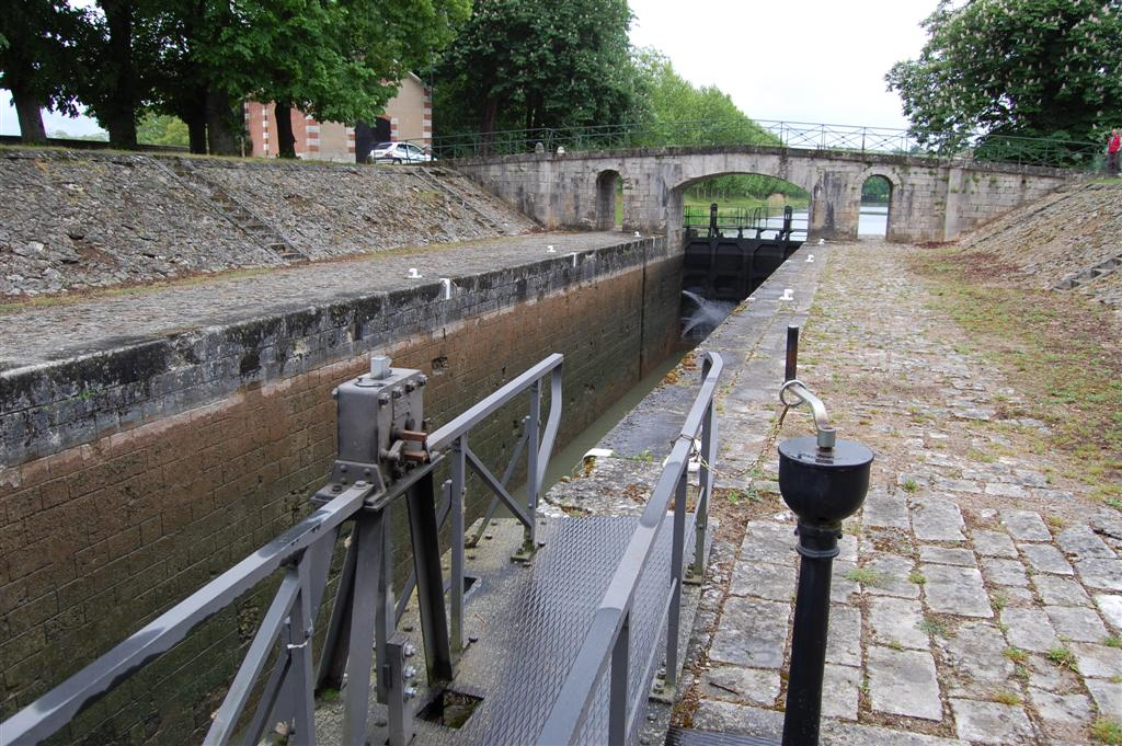 De oude sluis in Charite-sur-Loire die de verbinding maakt tussen de Loire en het Lateraal-kanaal.